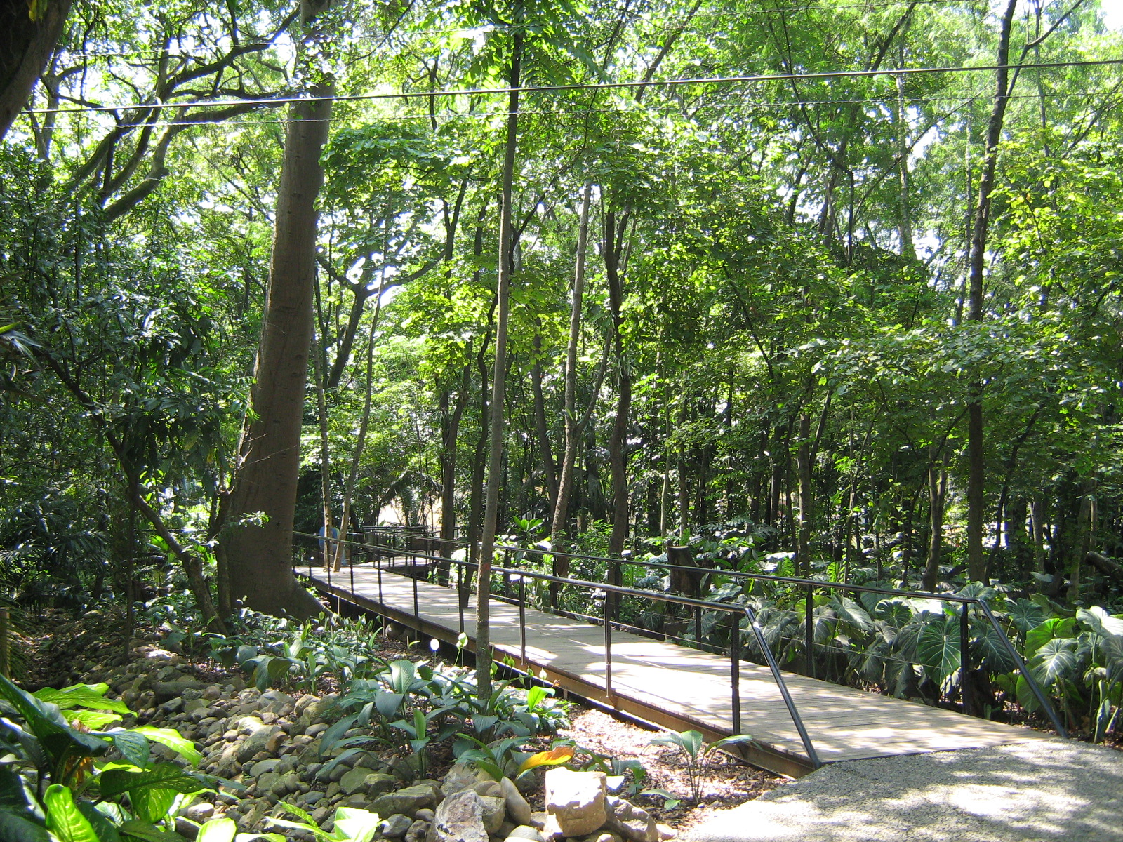 Bosque tropical en el Jardín Botánico de Medellín, Colombia